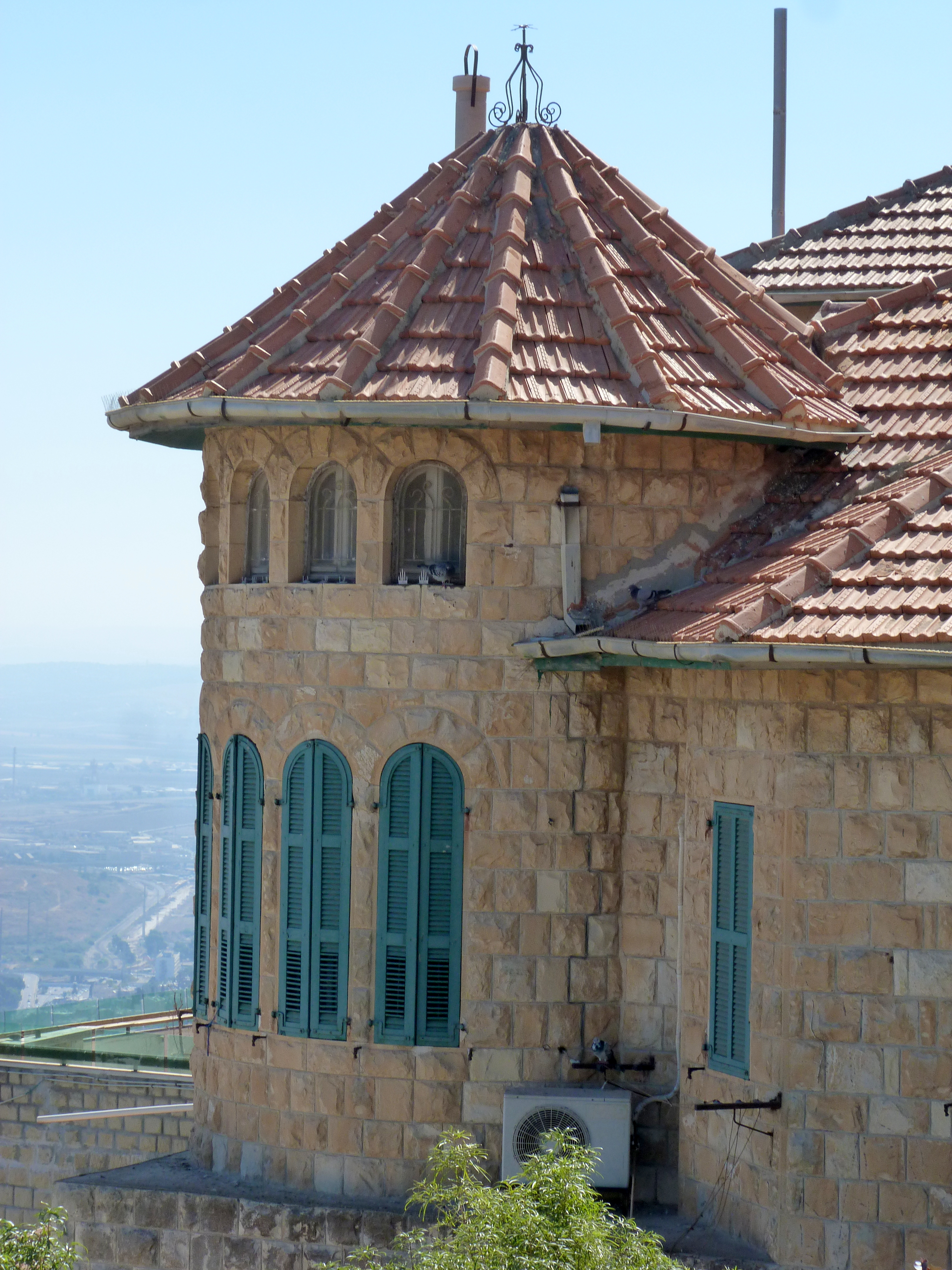 בית הטירה במרכז הכרמל בחיפה